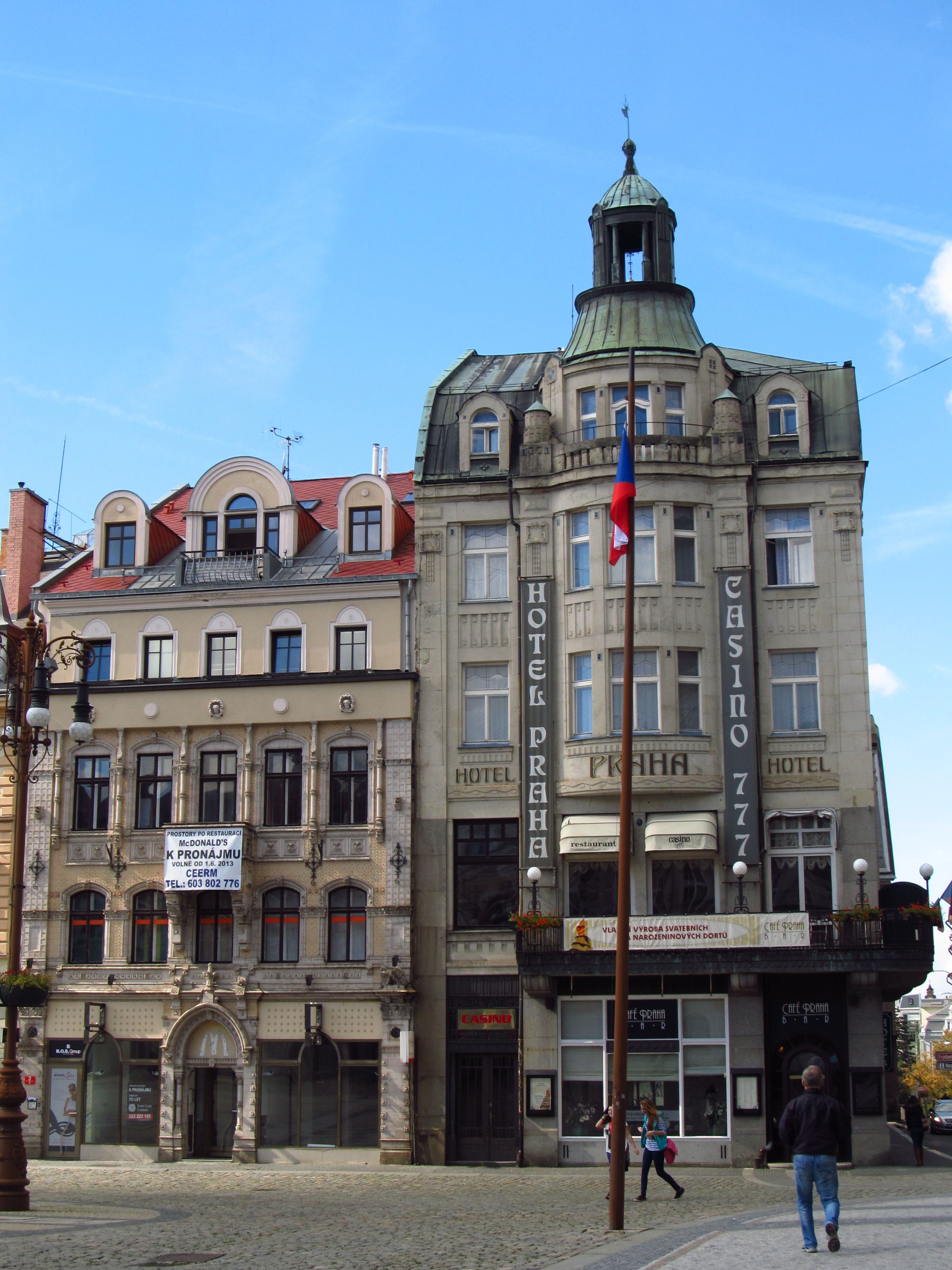 Hotel Praha (Liberec), Železná ul. 2/1, Liberec